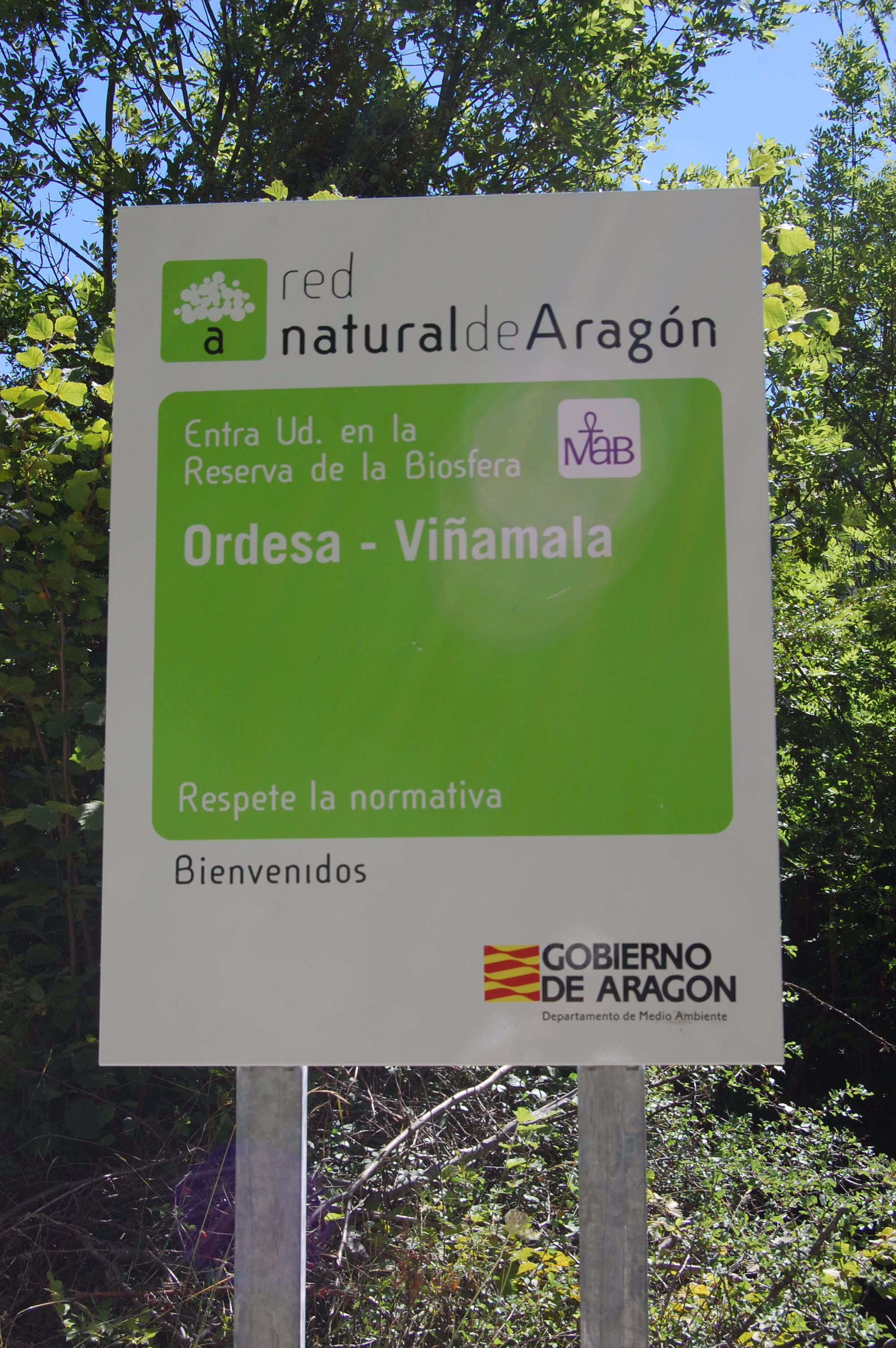 Aragonés: Cartel Ordesa-Comachibosa